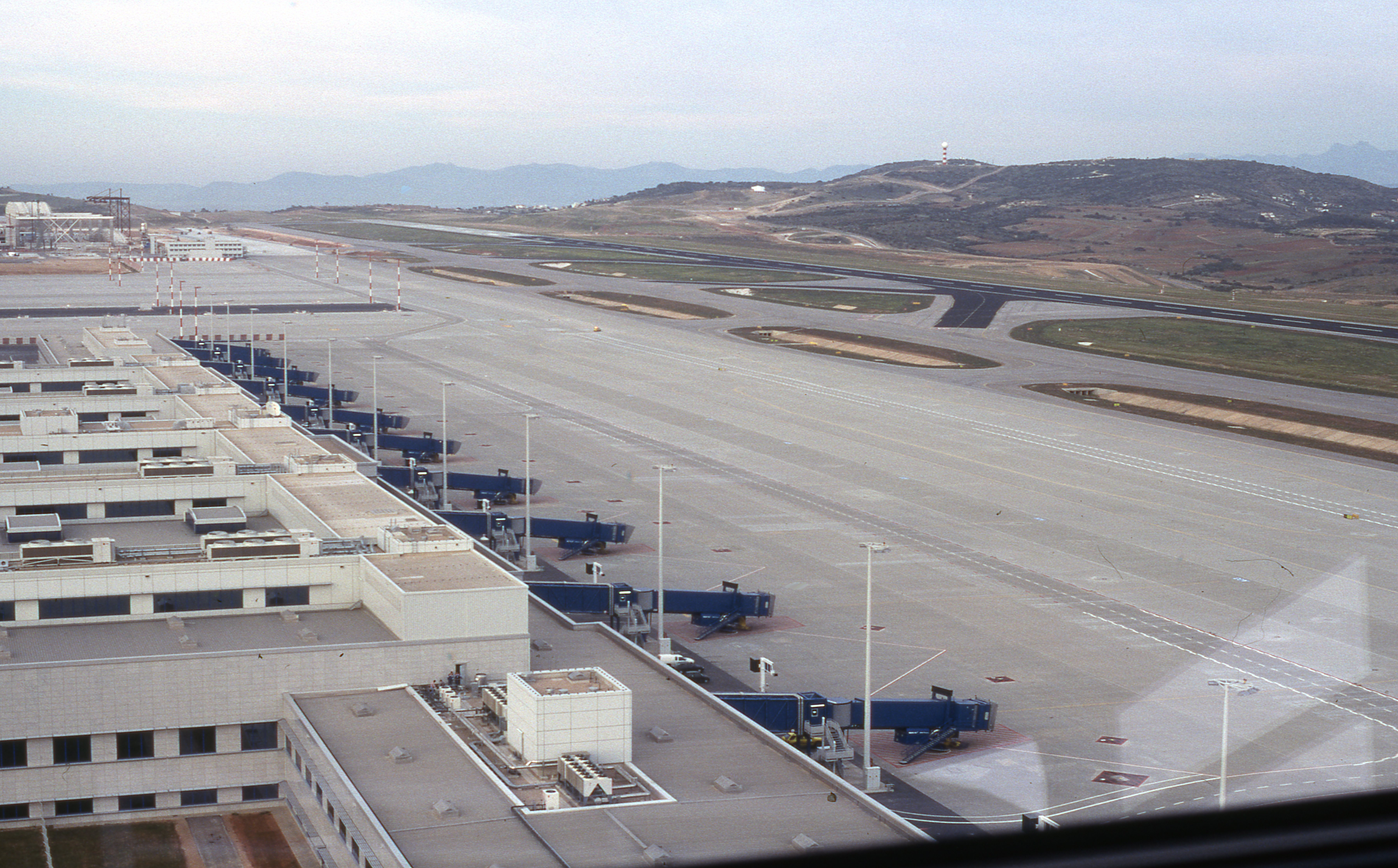 Aéroport international d'Athènes Elefthérios-Venizélos